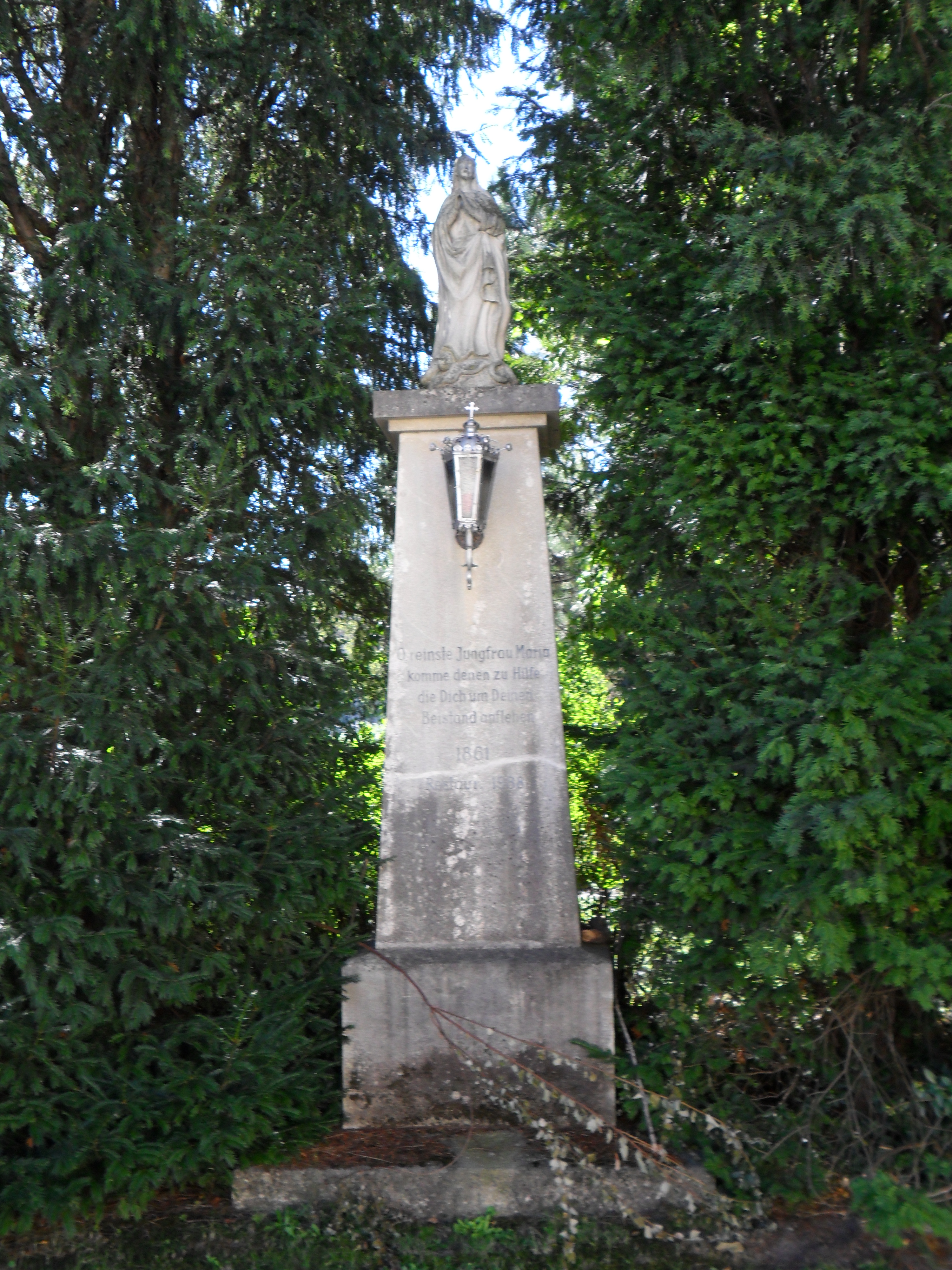 Figurenbildstock Maria Immaculata am Dreiecksanger in Breitenau (Niederösterreich)